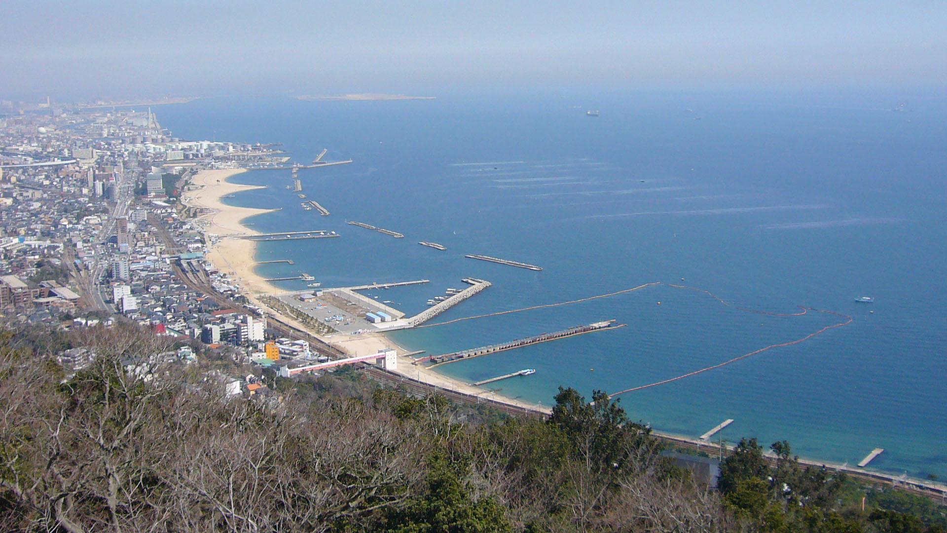 Sumaura Sanjo Amusement Park in Kobe, Hyogo prefecture, Japan